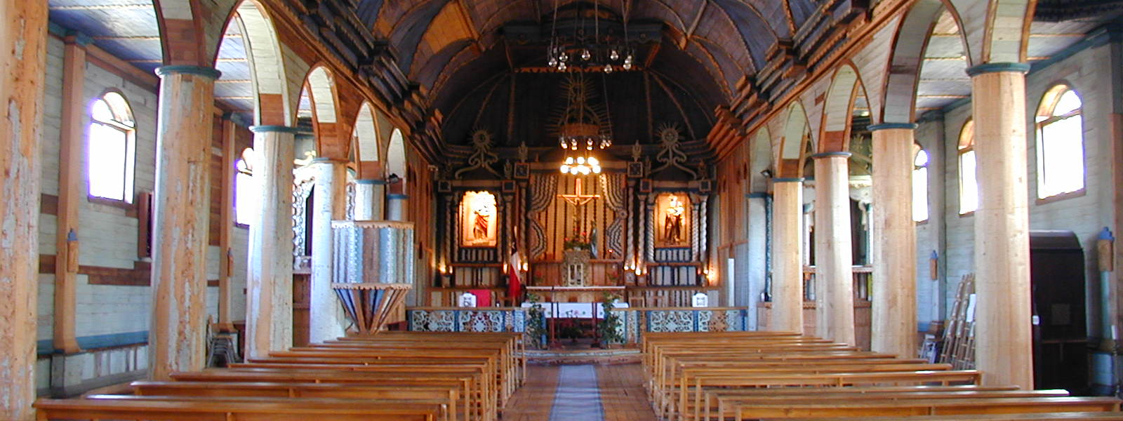 Nave central de la Iglesia de Achao, en la isla de Quinchao0010A3A95A00-0